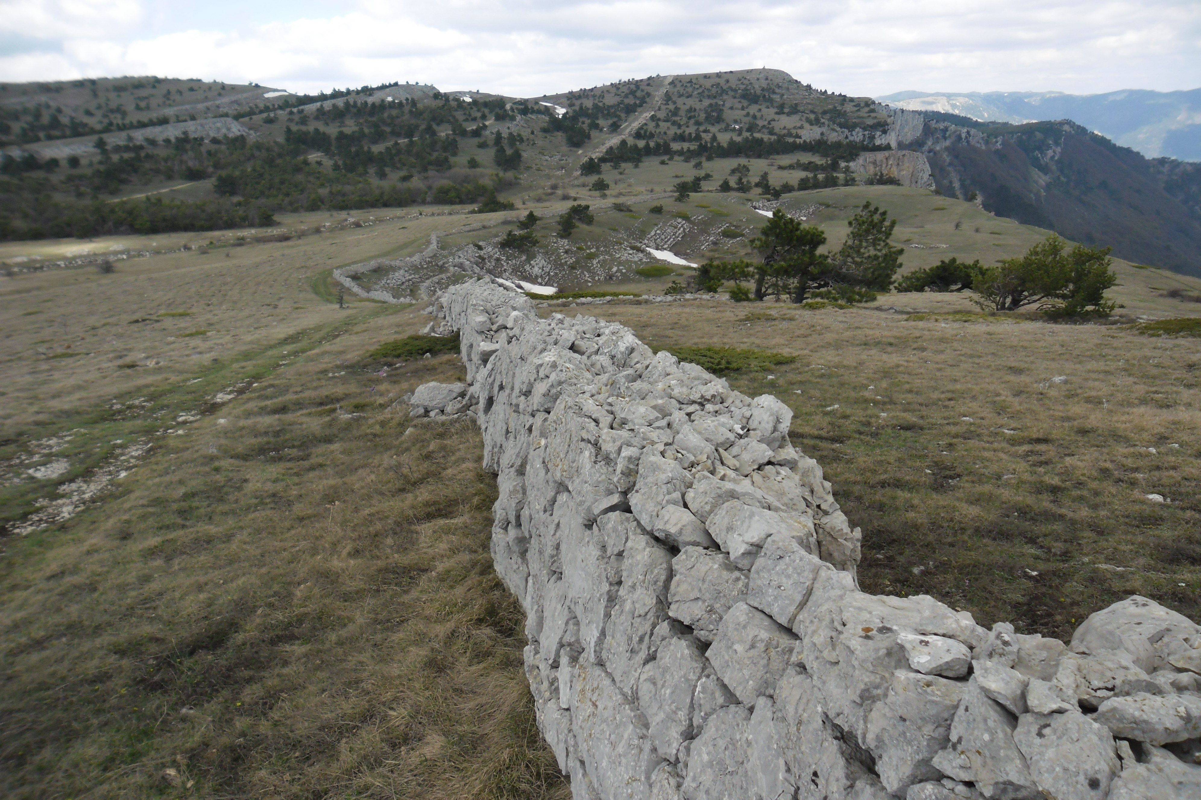 Паркан на Ялтинській яйлі